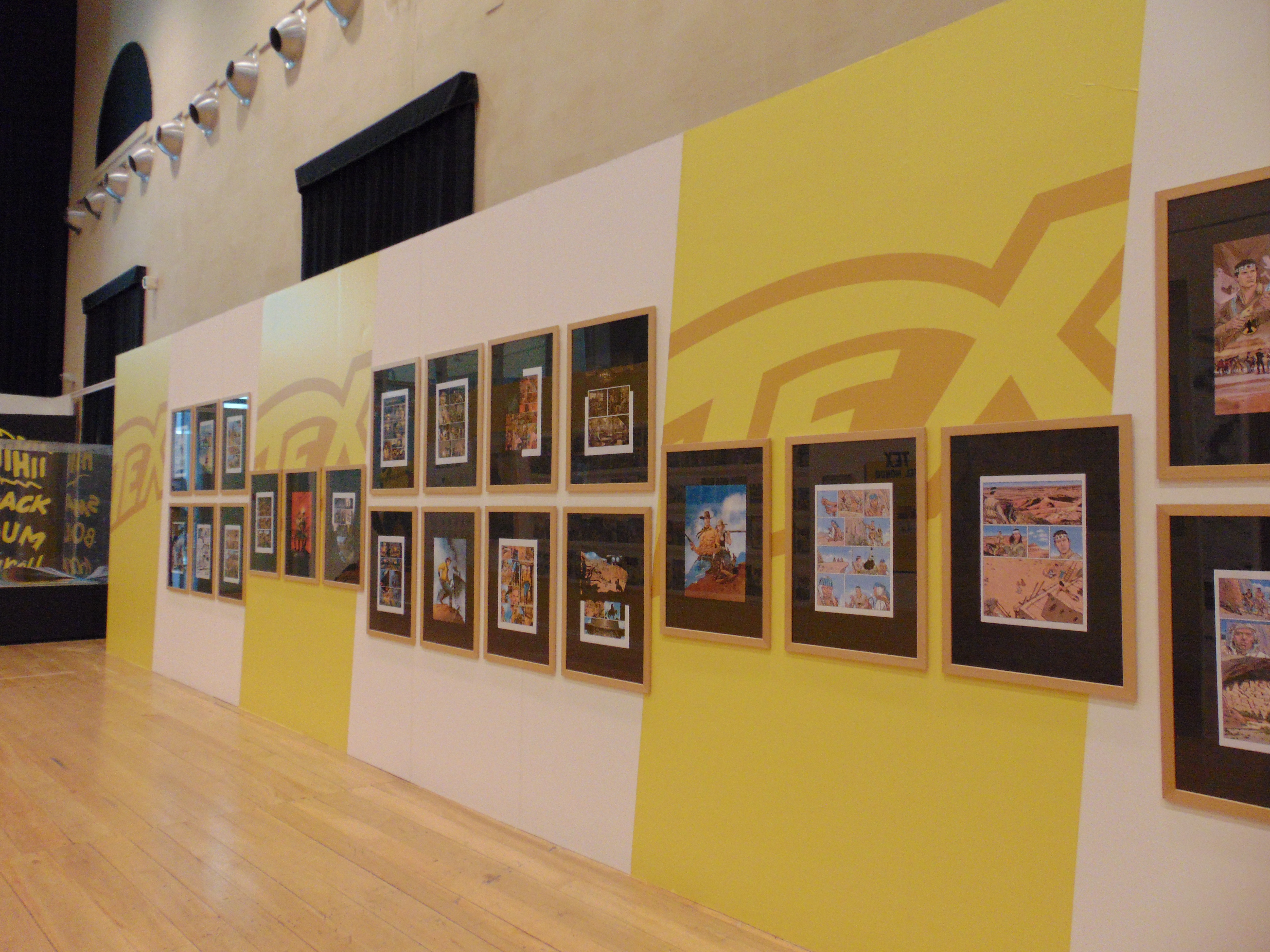 Tex - 70 anni di un mito @ Arf! Festival 2019